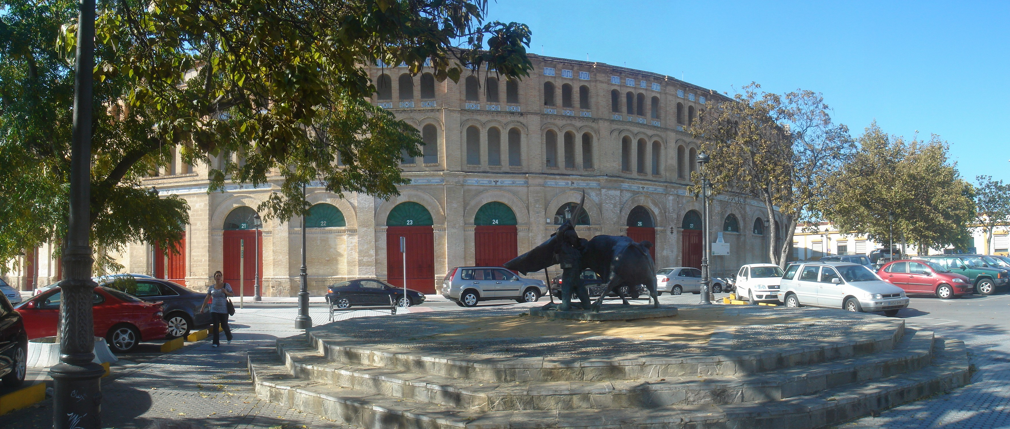 Foto del monumento a Francisco Rivera "Paquirri" y de la parte del sol de Real Plaza de Toros de El Puerto de Santa María